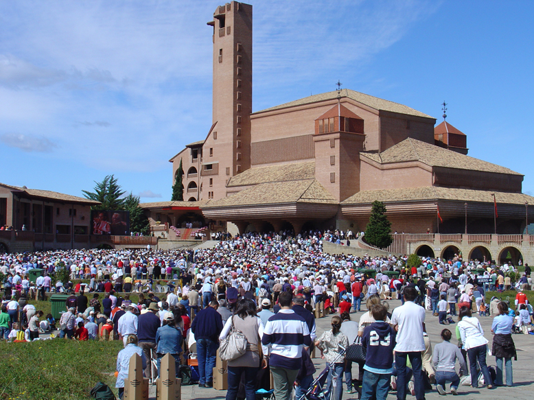 El Santuari de Torreciutat durant la Jornada Mariana de la Família del 2008.